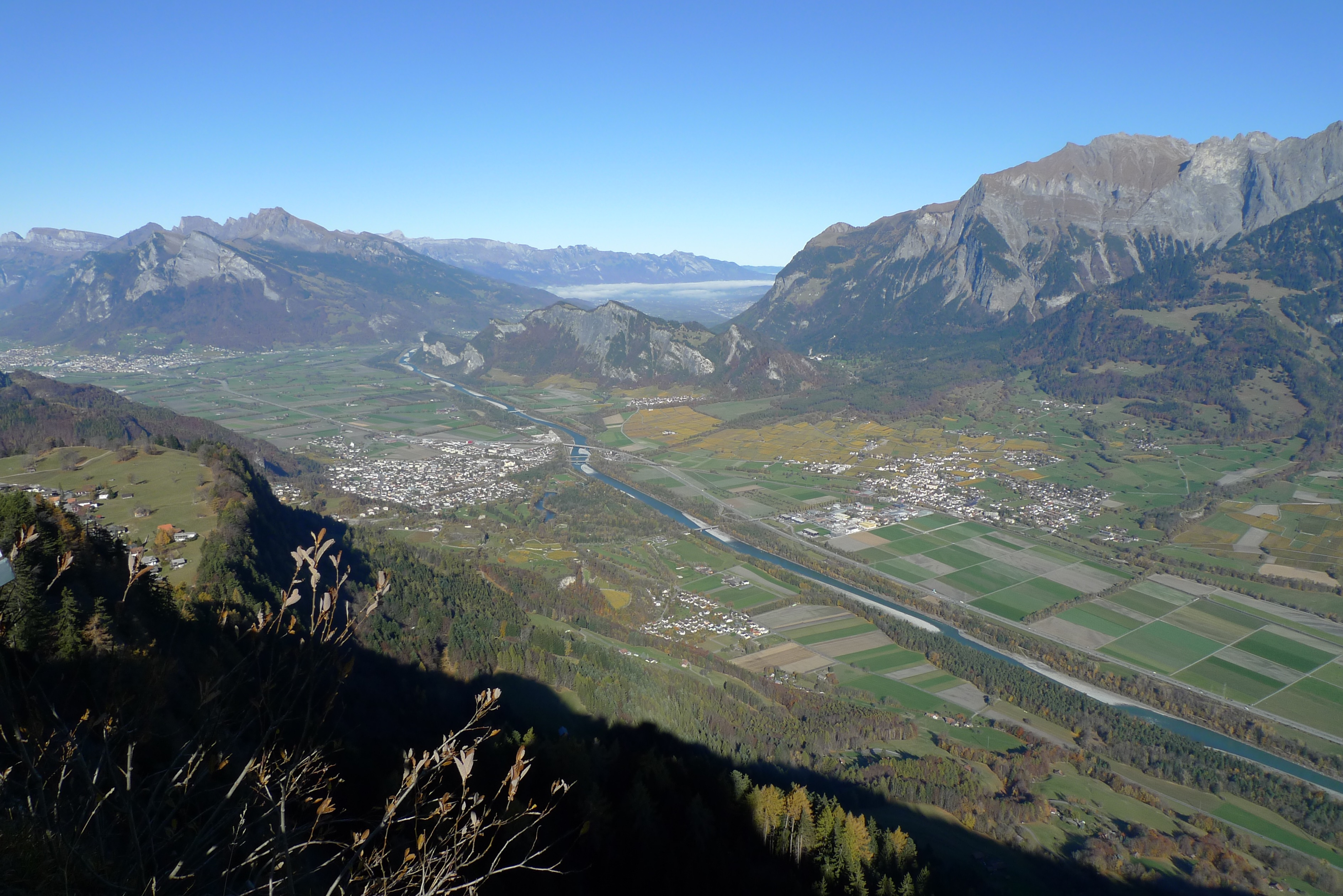 Aussicht vom Pizalun Richtung St. Luzisteig (grosse Ortschaften von links: Sargans, Bad Ragaz, Maienfeld).